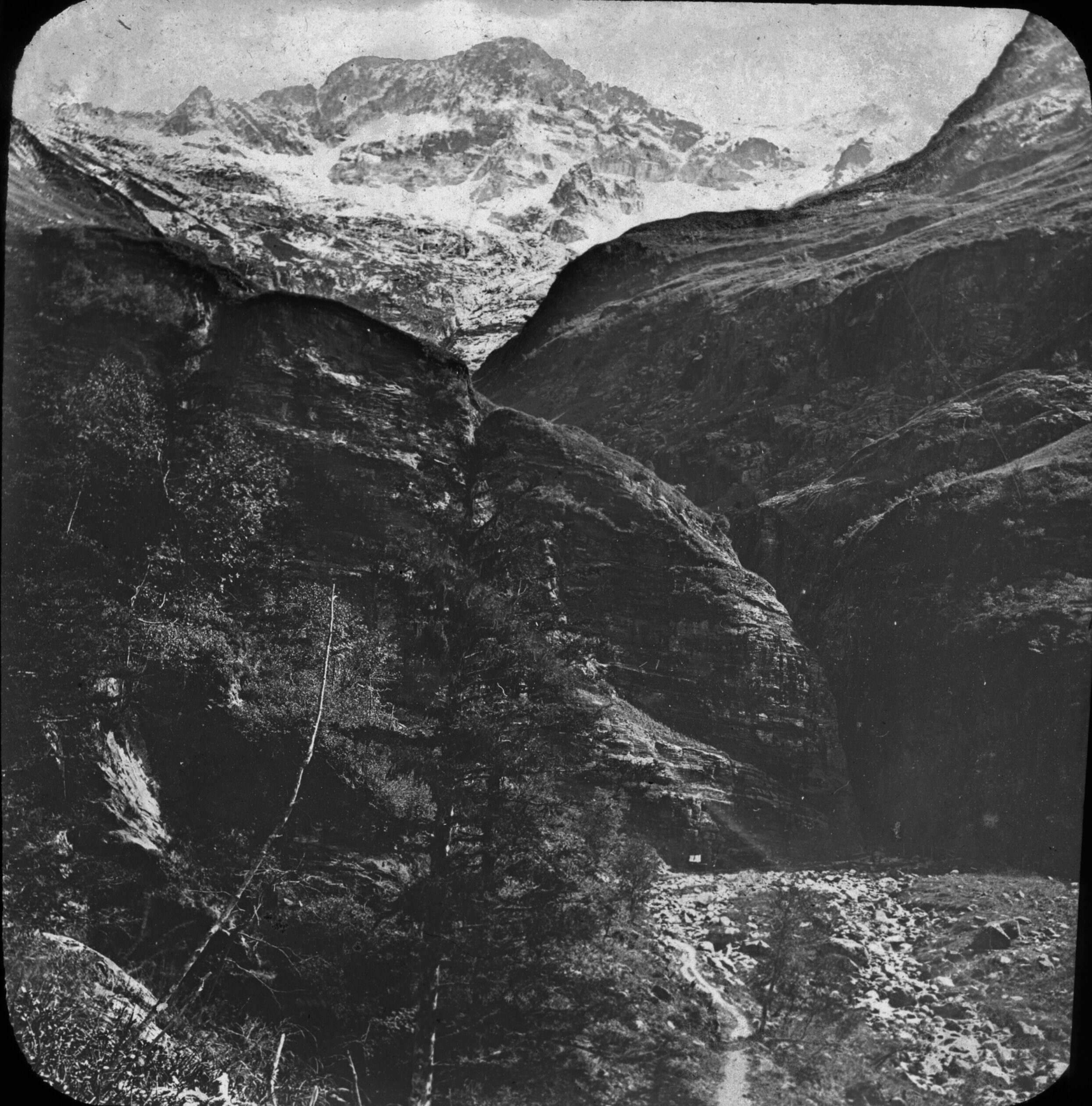 Fonds Trutat - Photographie ancienne Cote : TRU C 217 Localisation : Fonds ancien Original non communicable Titre : Parc d'Enfer et pic de Crabioules, Luchon [environs], vallée du Lys Auteur : Trutat, Eugène Rôle de l’auteur : Photographe Lieu de création : Bagnères-de-Luchon (Haute-Garonne ; canton) Date de création : : 1859-1910 [entre] Mesures : 10 x 9 cm Mot(s)-clé(s) : -- Montagne -- Gouffre -- Gorge -- Végétation -- Roche -- Crête (montagne) -- Pic (montagne) -- Neige -- Bagnères-de-Luchon (Haute-Garonne ; canton) -- Lys, Vallée du (France) -- Crabioules (France ; pic) -- Enfer, Rue d' (France ; gorges) -- Luchonnais, Massif du (France) -- 19e siècle, 2e moitié -- 20e siècle, 1e quart Médium : Photographies -- Noir et blanc -- Positifs au collodion sur plaque de verre -- Paysages de montagne Bibliographie : Frappé (Jean-Bernard). - Autrefois Bagnères de Luchon. Tome II. - Anglet : Atlantica, 2001. - 297 p. ; 15 x 22 cm. - (Autrefois) cf. p. 236-237 Bibliothèque de Toulouse. Domaine public